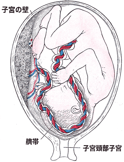 Japanese language version